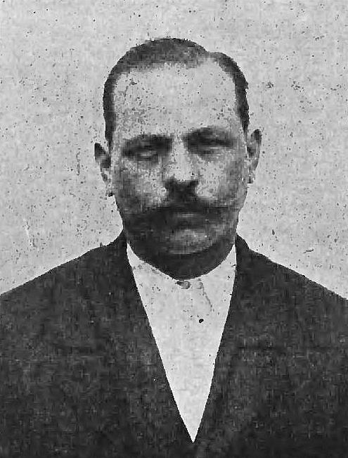 Józef Staniszewski (-1907)